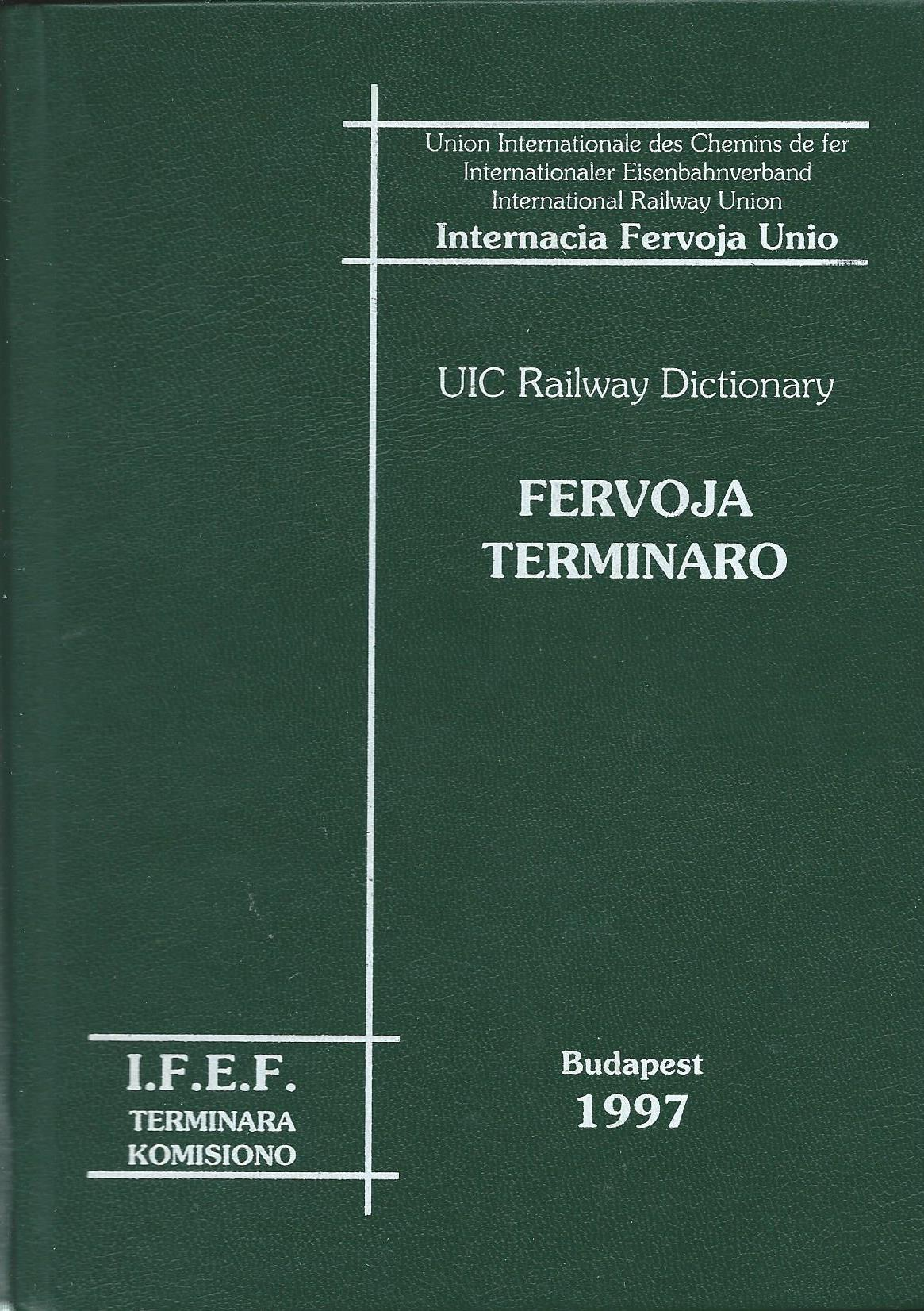 Librokovrilo de "Fervoja Terminaro", 1997